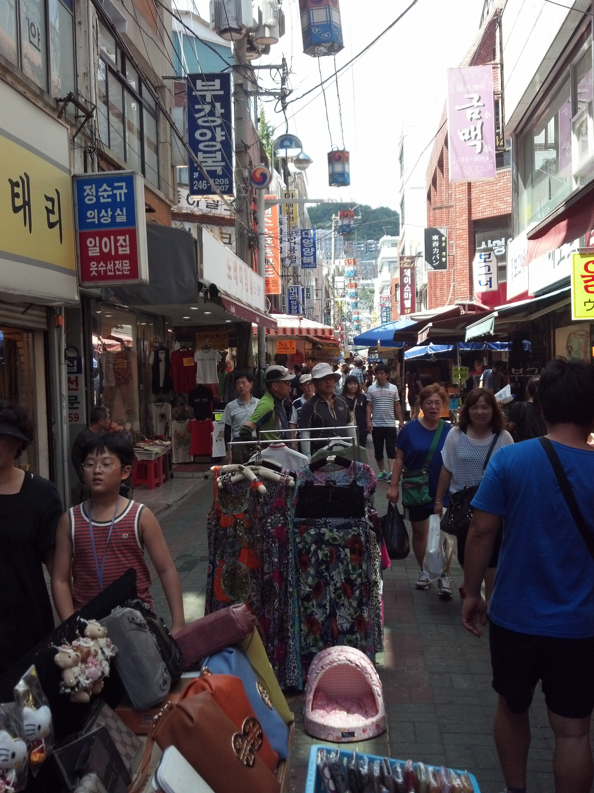 This picture is the scene of Kookje Market in Busan. It was taken at August 2012.